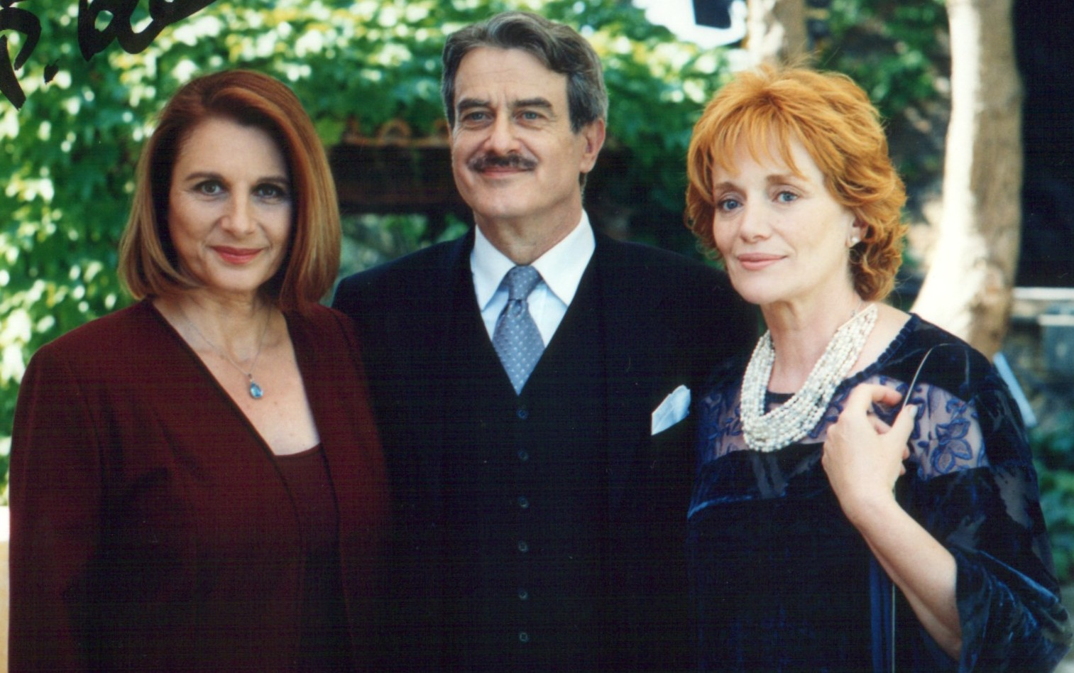 Foto da me scattata nel set di Incantesimo, durante le pause di lavorazione.